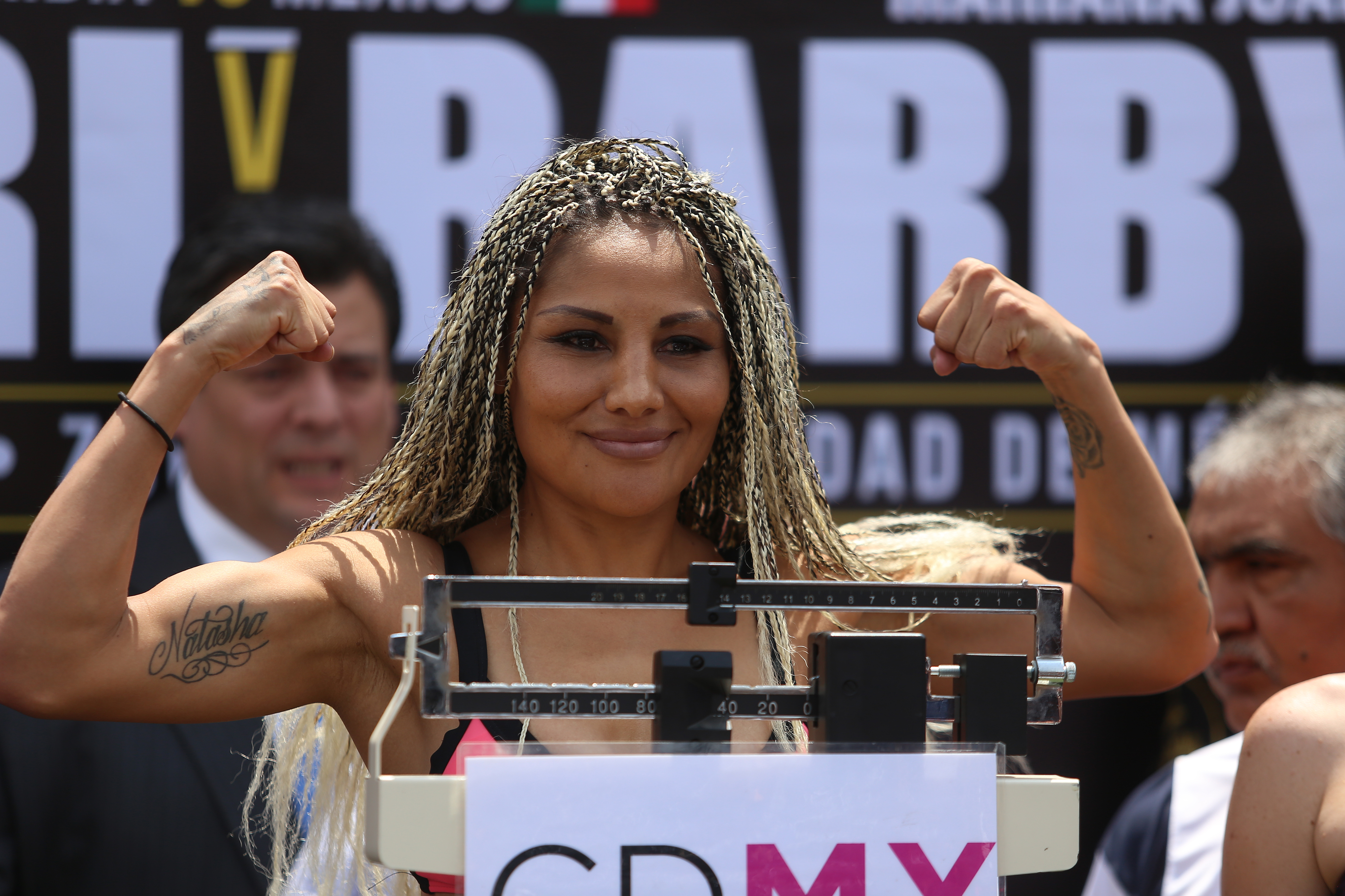 Presentación Función de Box Zócalo